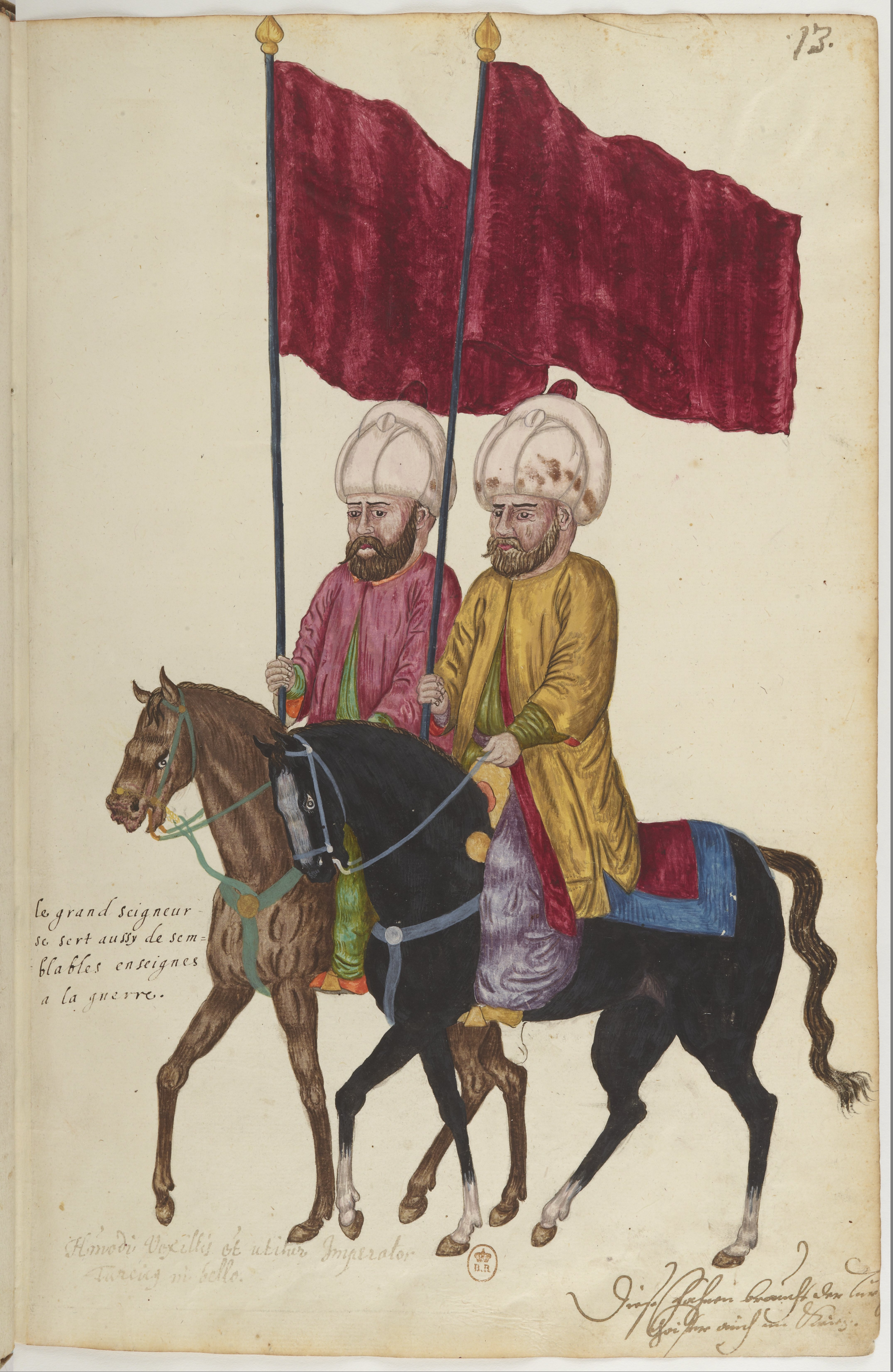 Le grand seigneur se sert [aussi] de semblables enseignes à la guerre